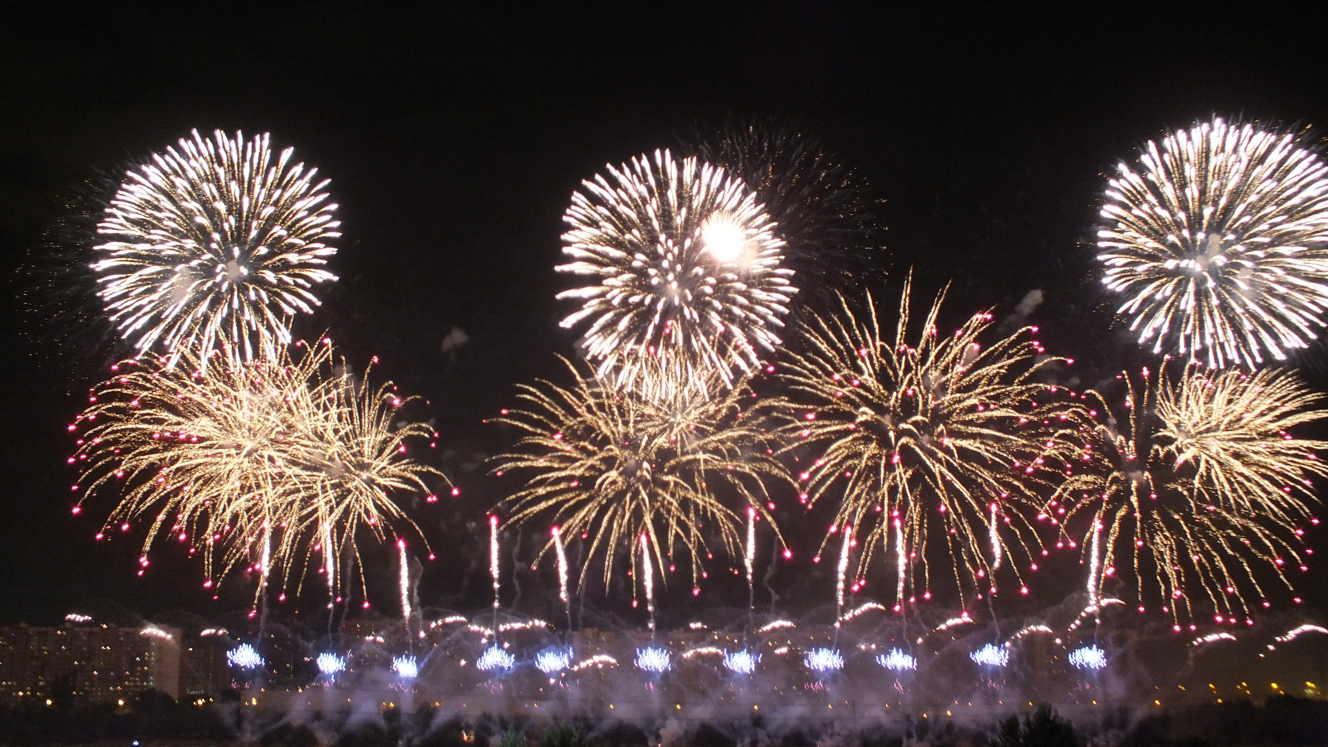 Одна из фотографий выступления команды Румынии на Международном фестивале фейерверков 19 августа 2017 года в Москве